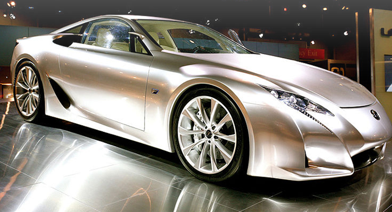 Lexus LF-A